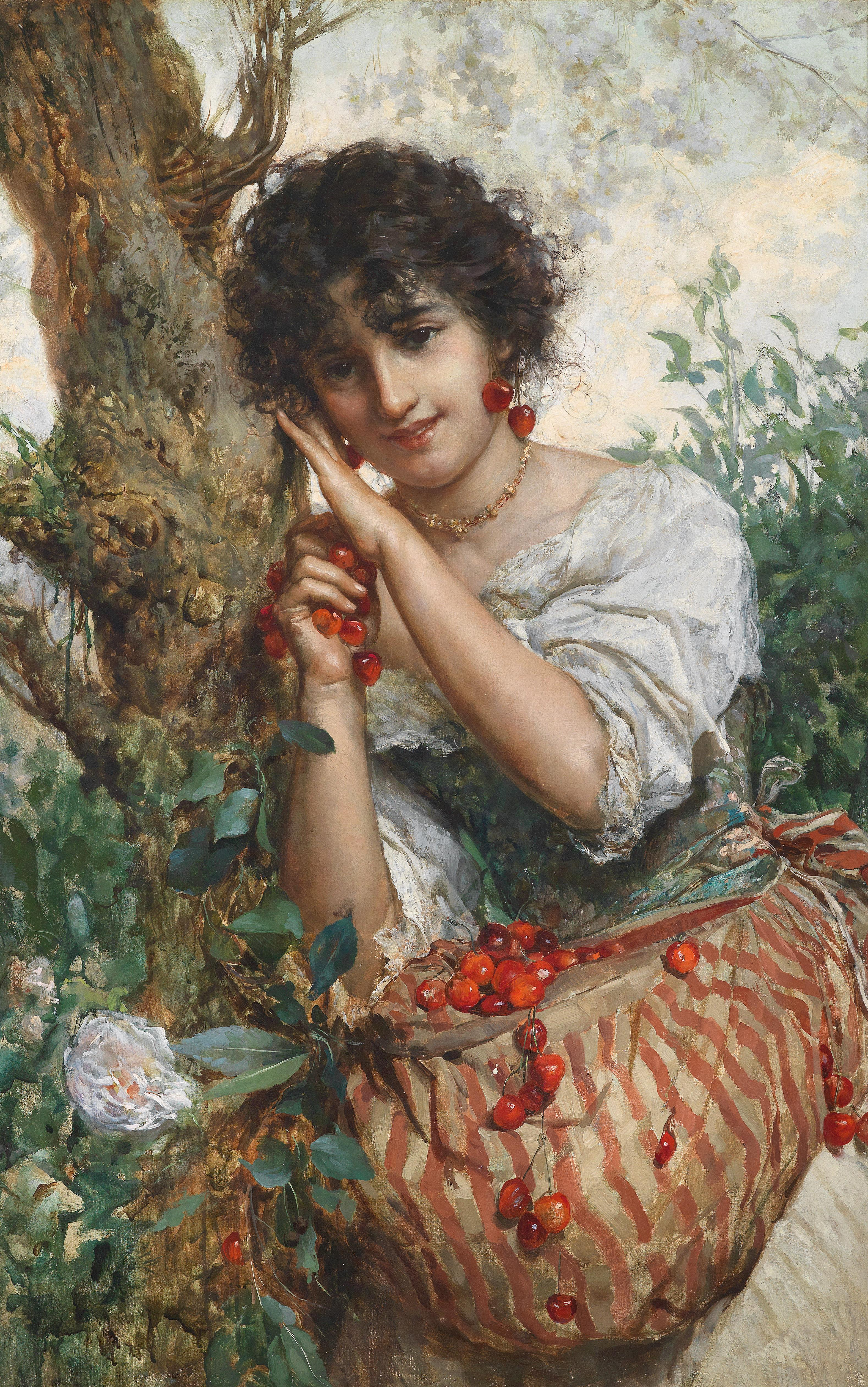 Kirschenzeit Cherry time